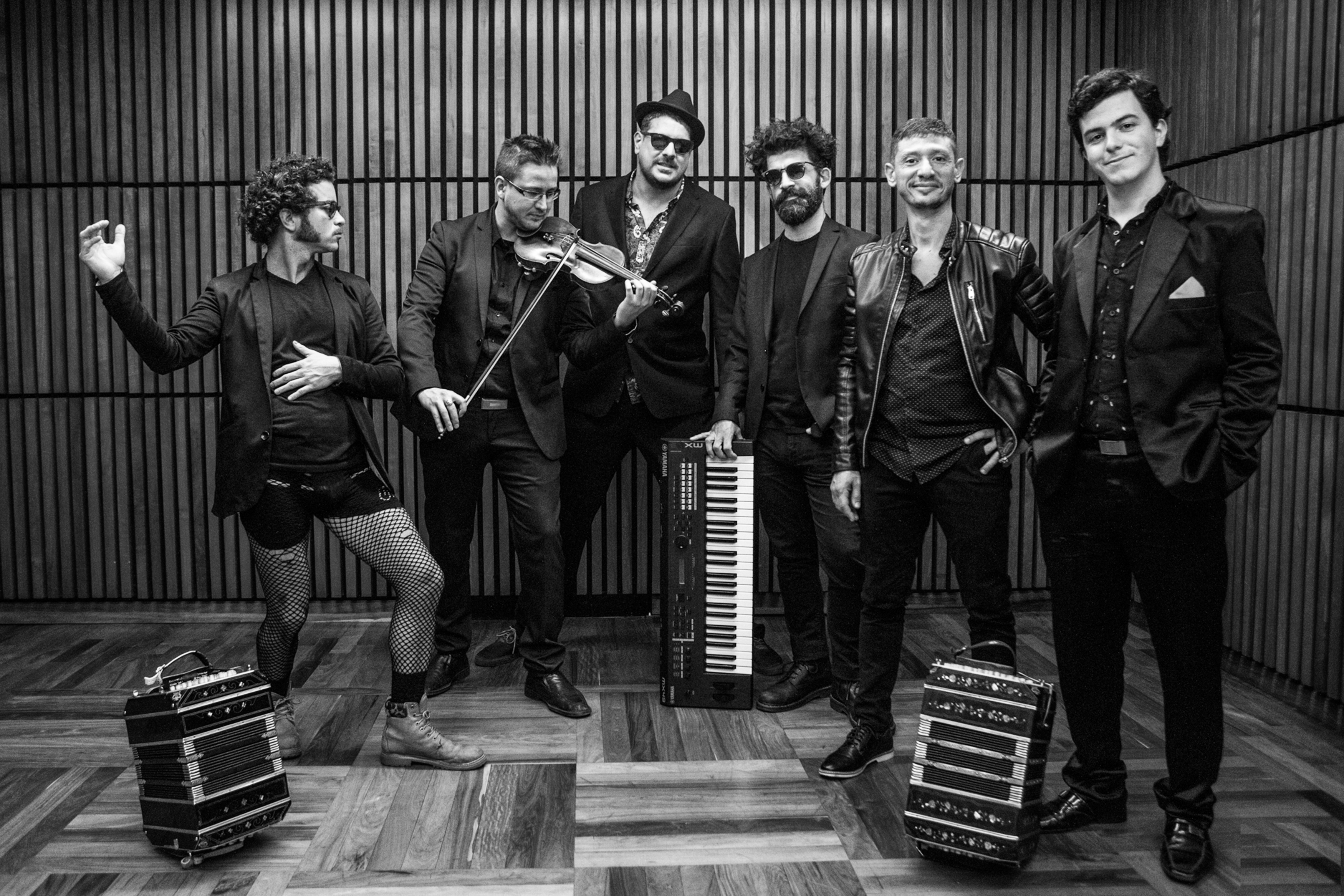 TANGHETTO posando con la formación del 2019